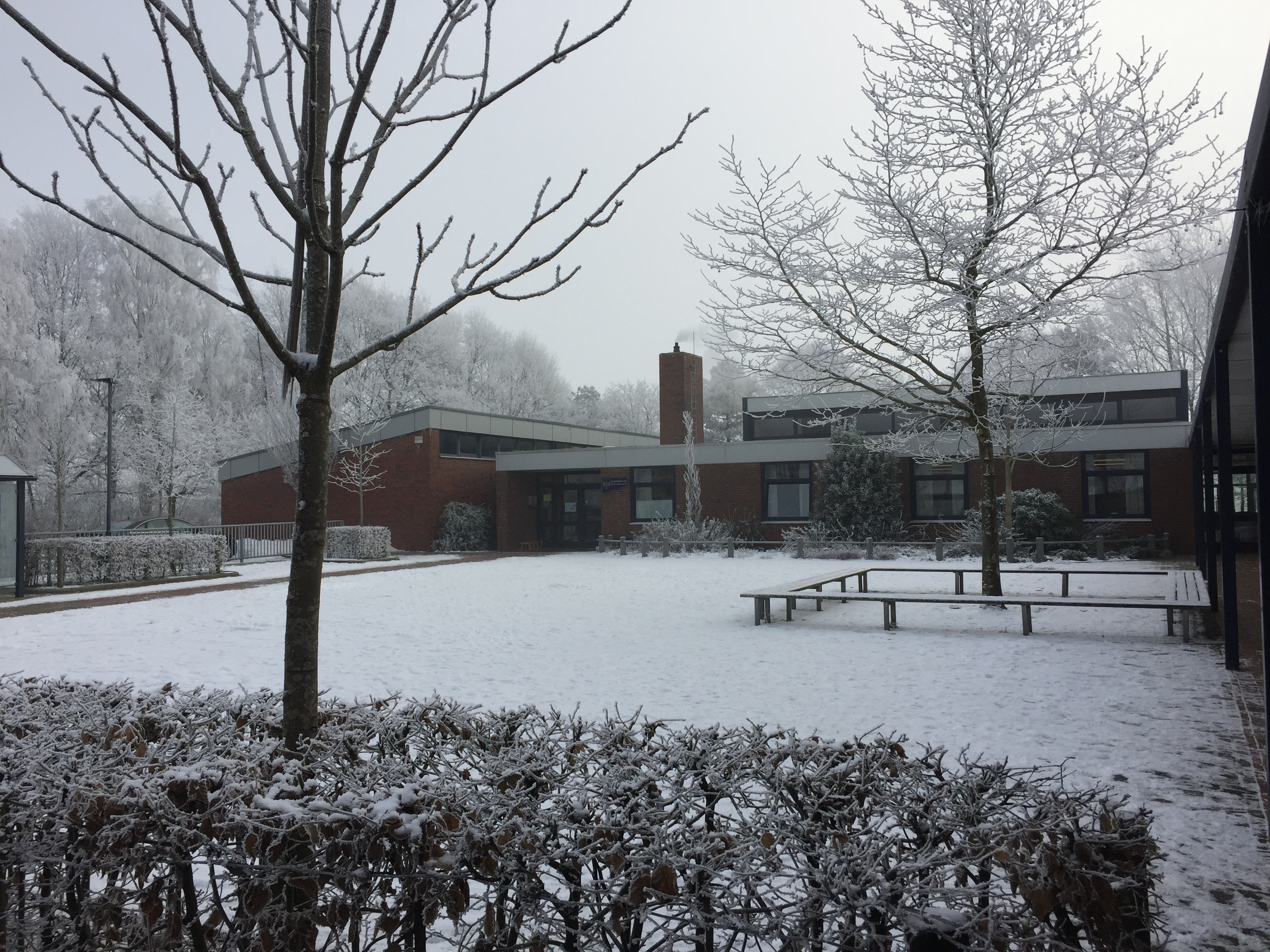 Die Grundschule Höltinghausen im Winter 2017.